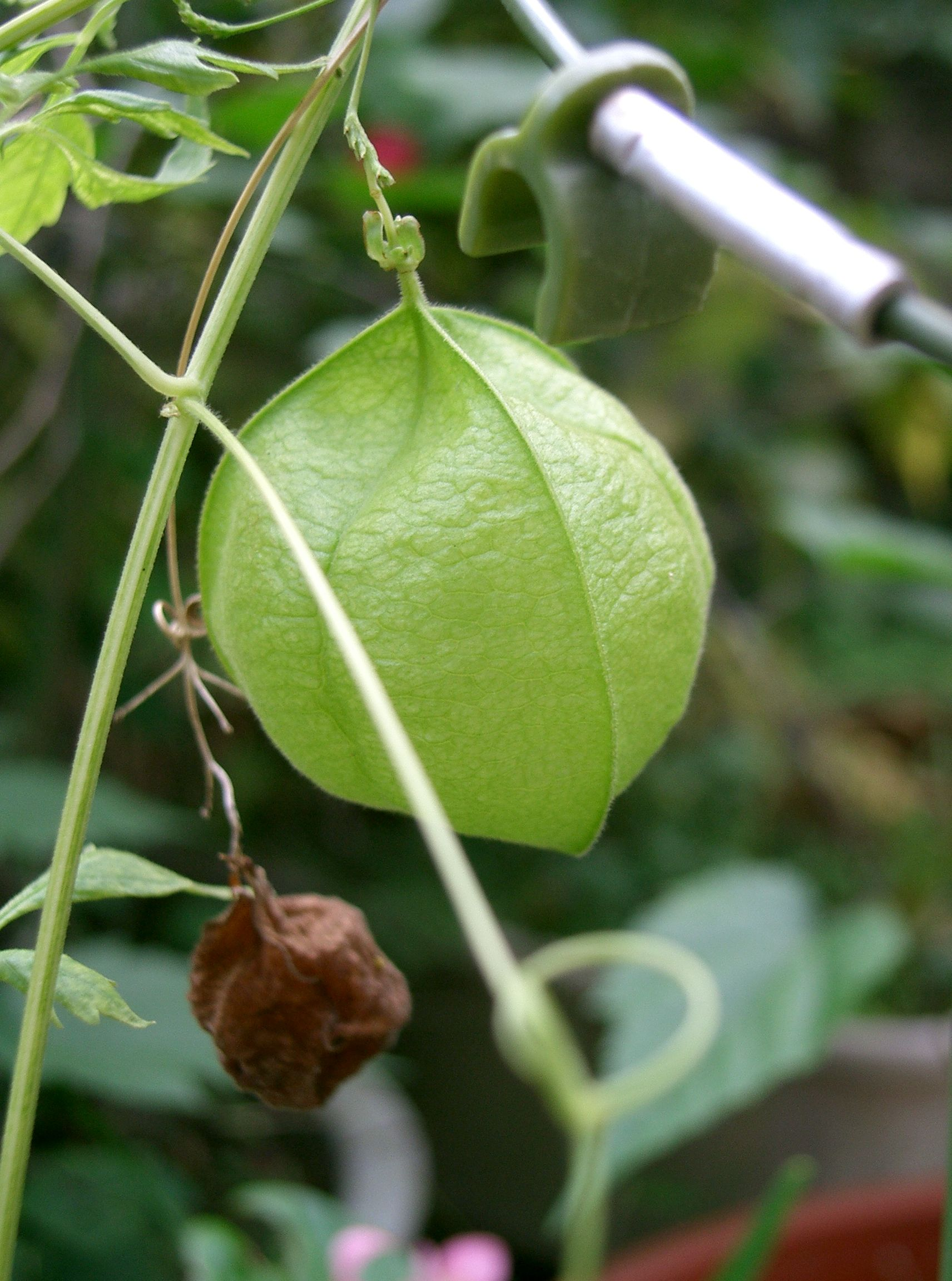 Cardiospermum halicacabum